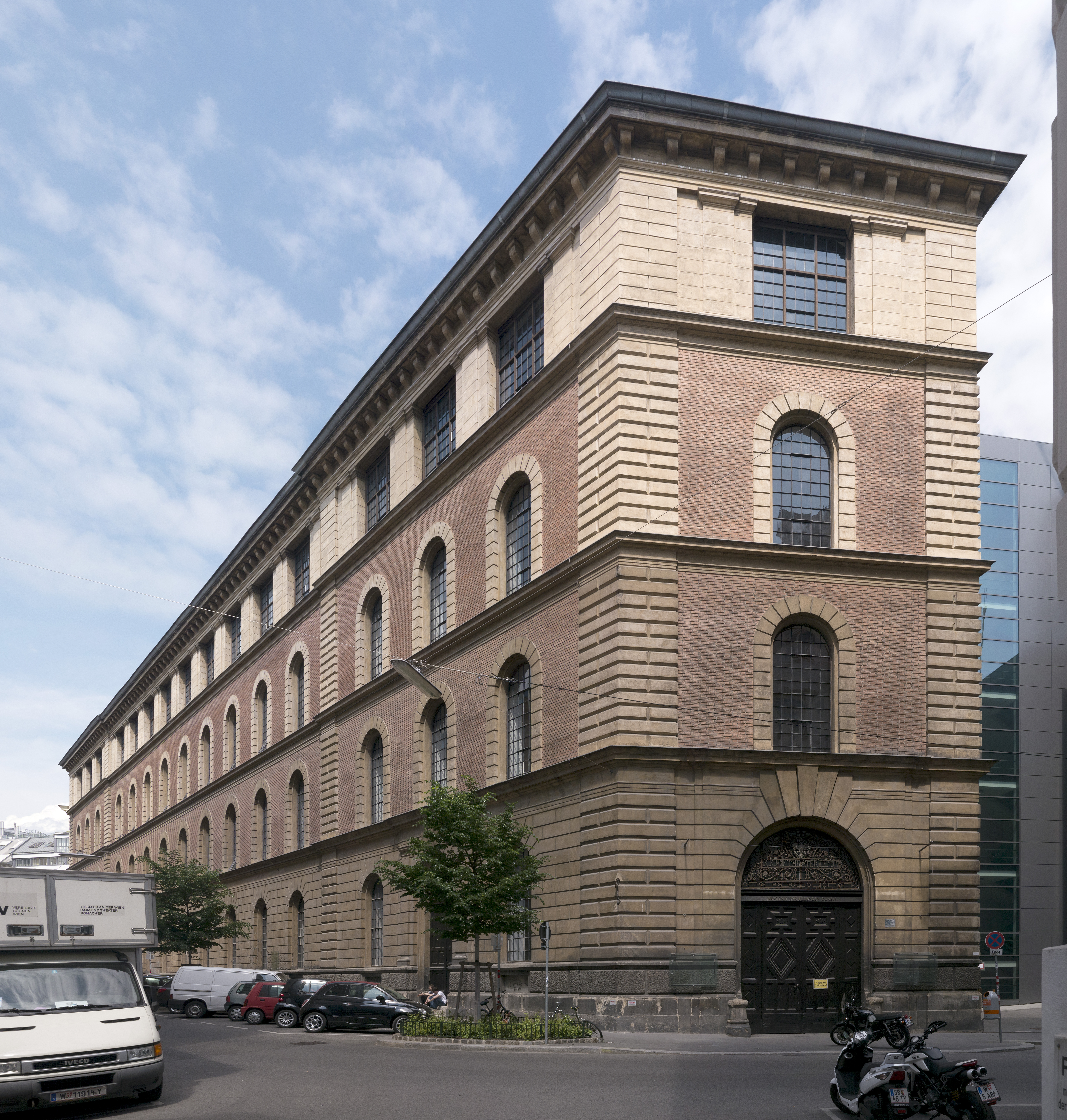 Ehem. Hofkulissendepot, sogen. "Semper-Depot", heute Atelierhaus der Akademie